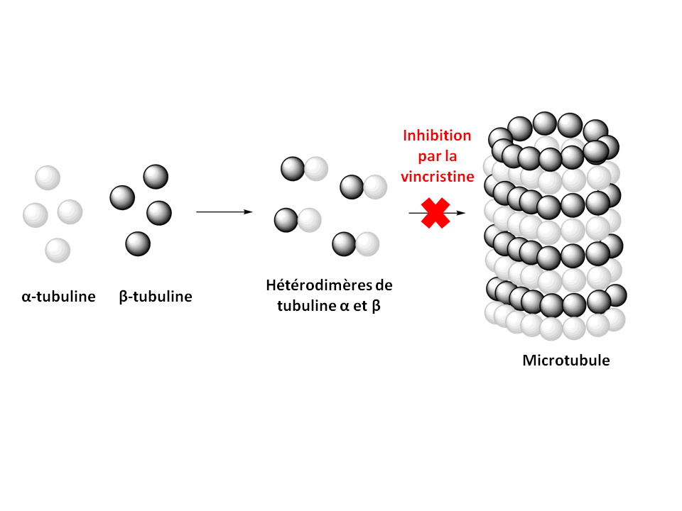 Mécanisme d'action de la vincristine